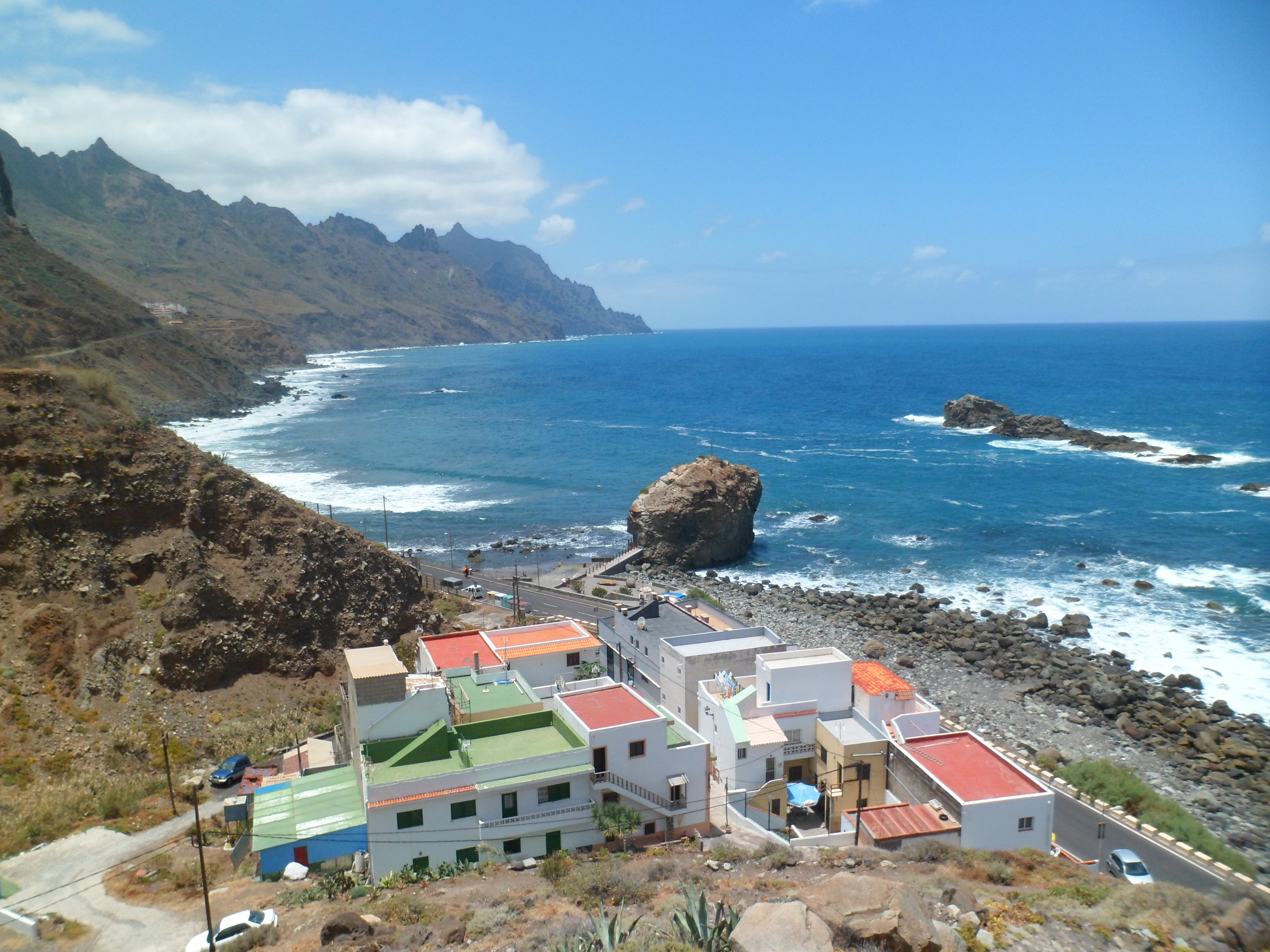 Núcleo costero de Roque de las Bodegas, en Anaga (Tenerife).